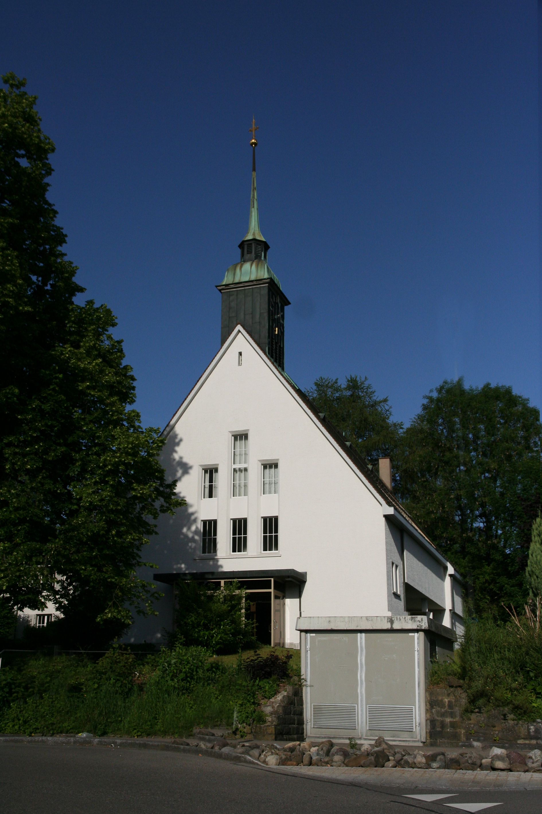 Römisch-katholische Kirche St. Josef Lindau-Grafstal, Anblick von Osten